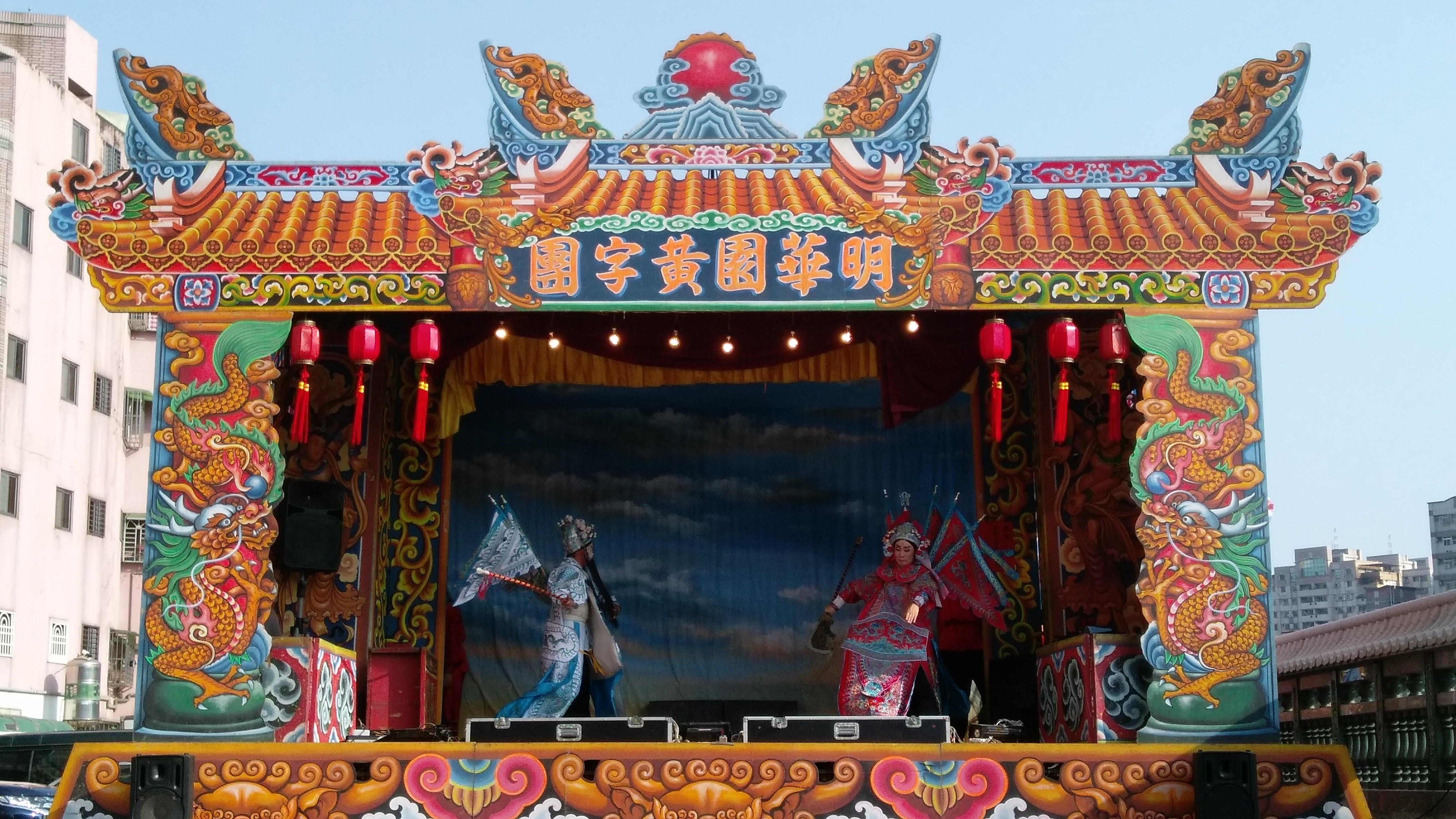 中文（台灣）: 明華園黃字團演出